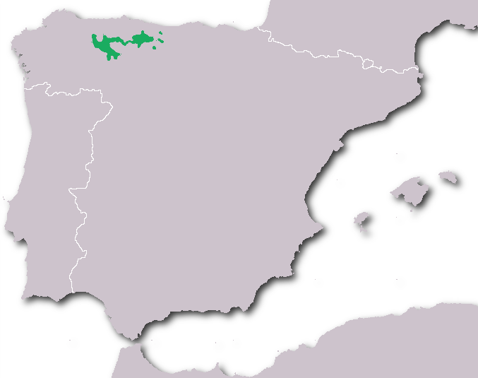 Distribución de la subespecie de urogallo cantábrico.